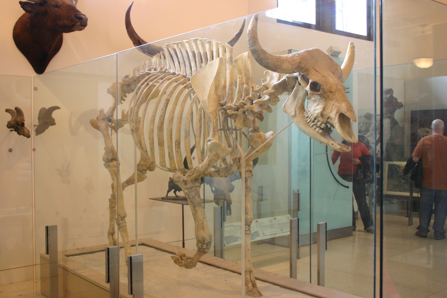 Bos gaurus grangeri Colbert & Hooijer 1953